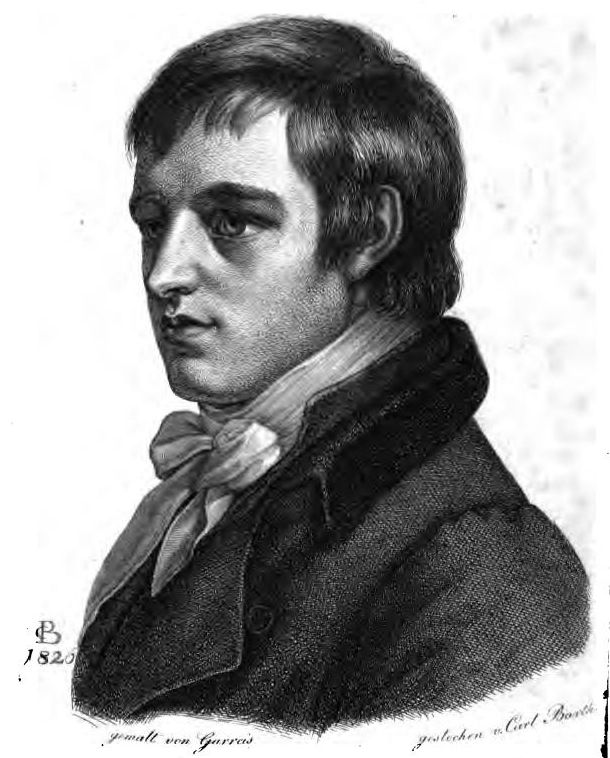 Heinrich Voß (1779—1822), German philologue and translator, son of Johann Heinrich Voß (1751—1826)